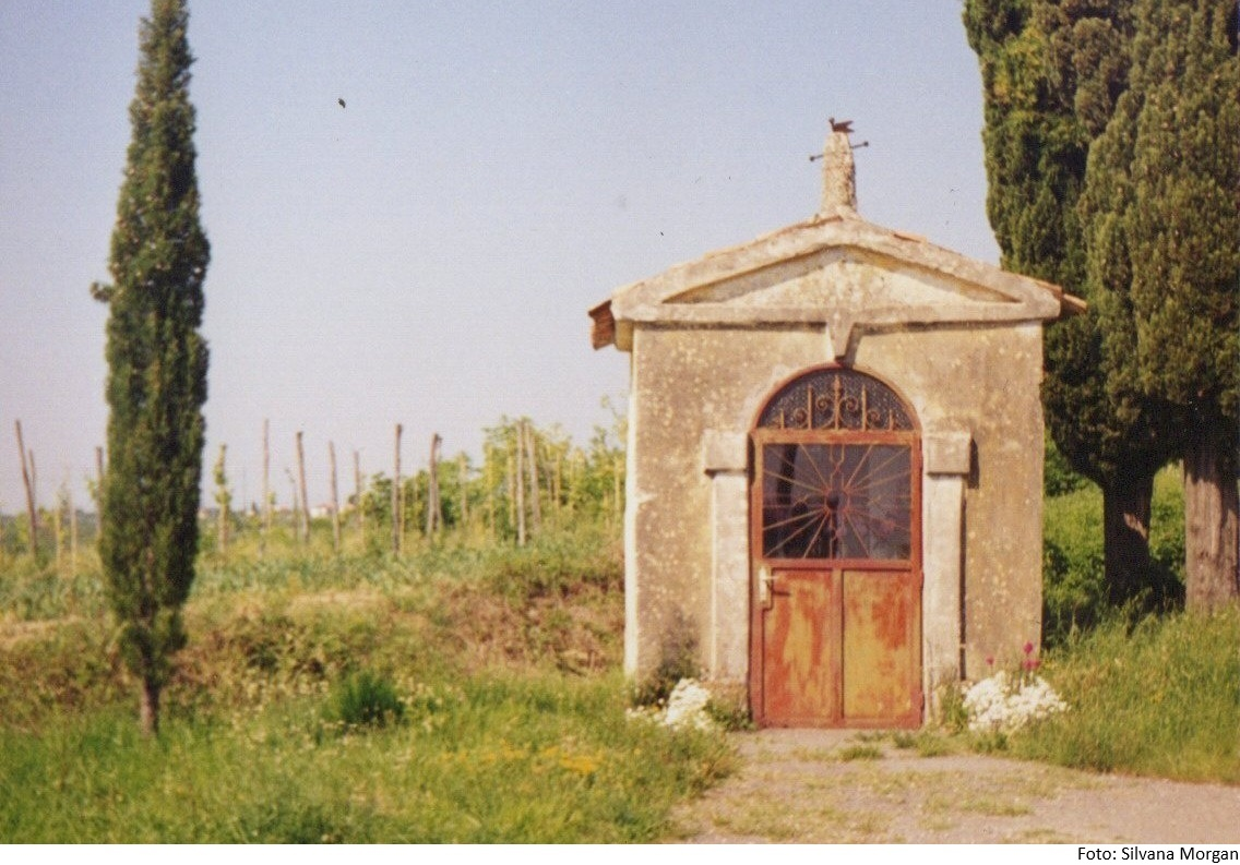 Kapelica svete Marije – zgrajena v začetku 20. stoletja